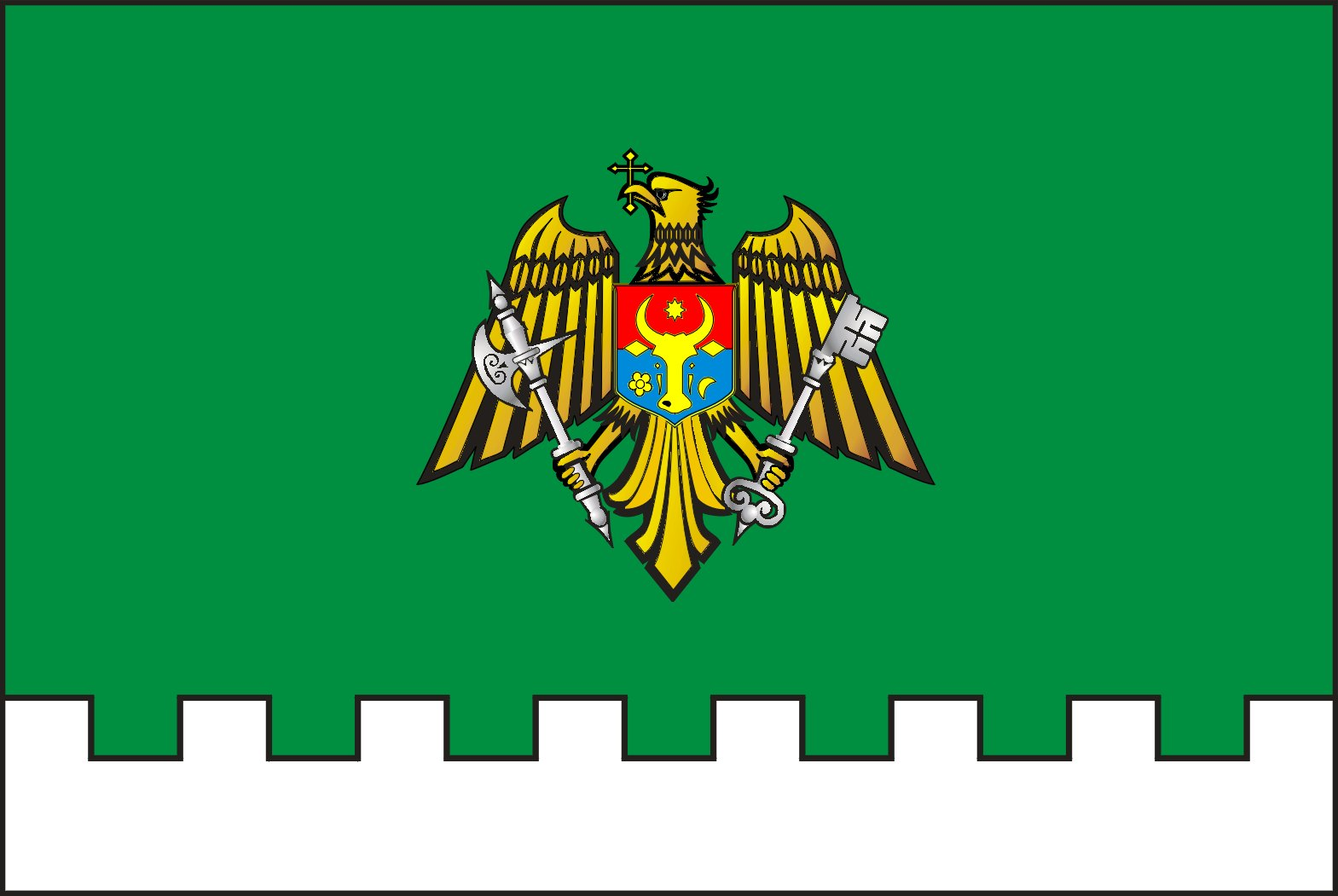 Drapelul Serviciului Grăniceri al Republicii Moldova